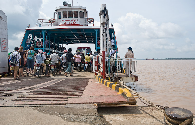 Mekong - Tra Vinh